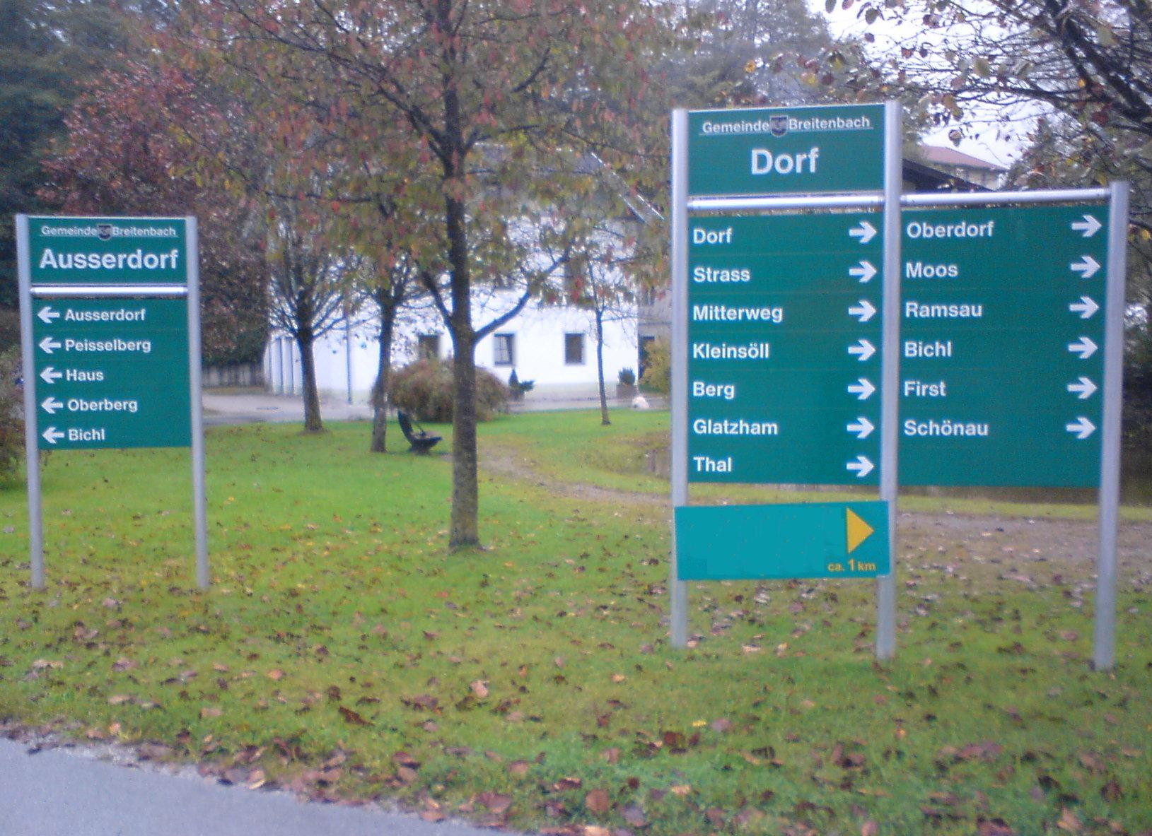 neue Ortsteilbeschilderung beim Kreisverkehr